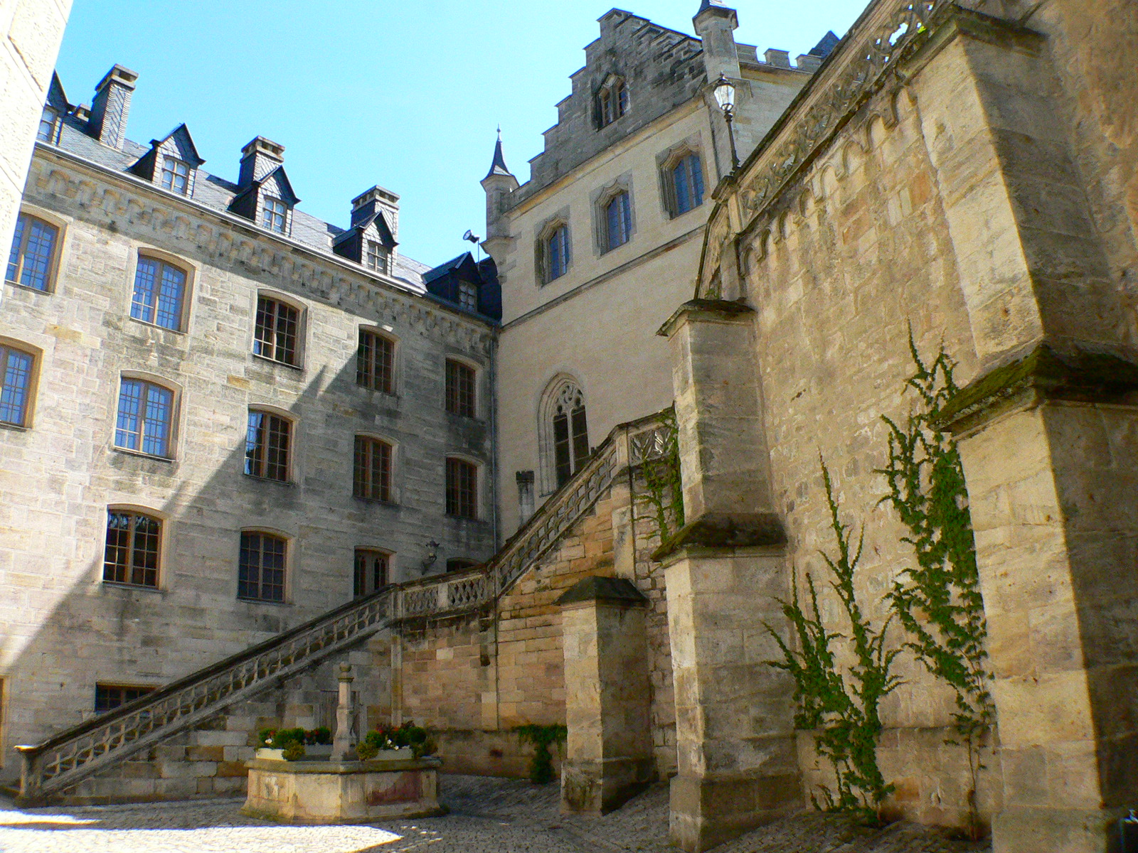 Schloss Callenberg bei Coburg (Germany, Bavaria): Innenhof mit Treppenaufgang zum Rosengarten